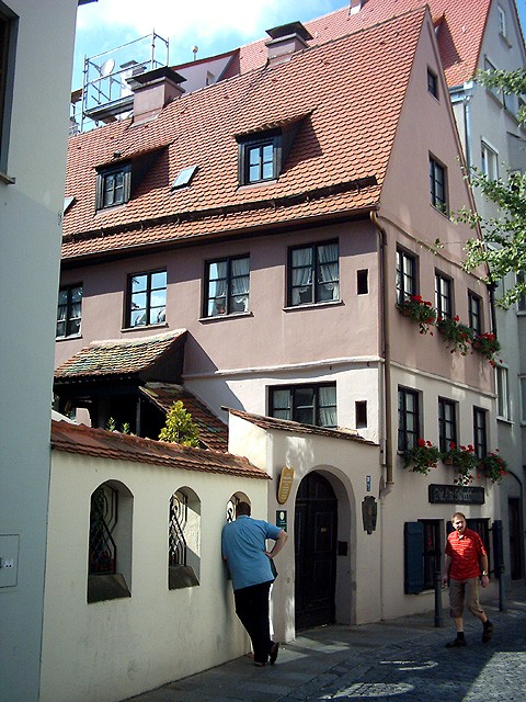 Augsburg (Bayern): Alte Silberschmiede im Handwerkerviertel Bildautor: Peter Bubenik - Aufnahmedatum: 03.09.2004